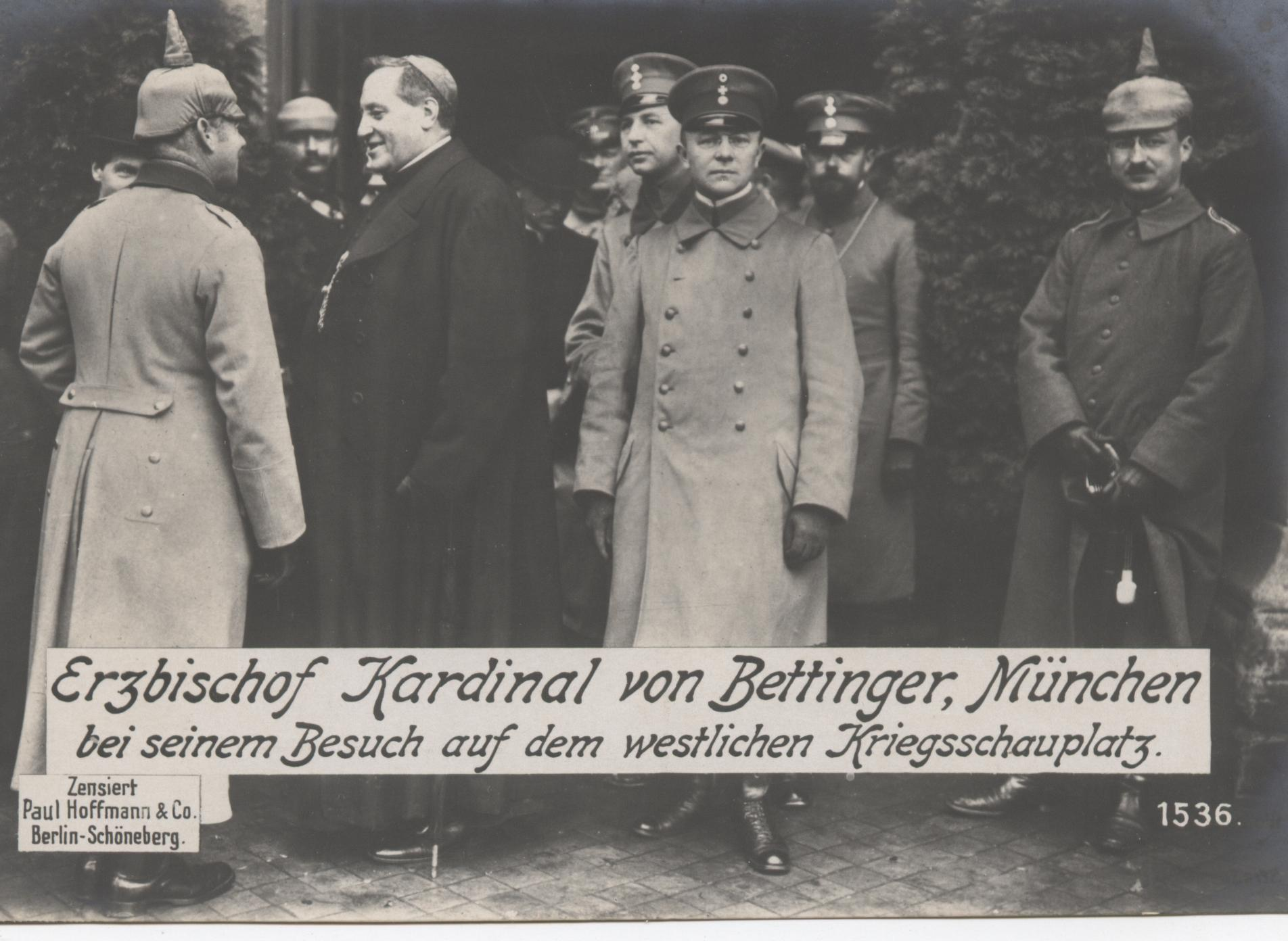 Frontbesuch des Münchener Kardinals Franziskus v. Bettinger 1916. Rechts vom Kardinal, mit hellem Mantel in die Kamera blickend, sein Sekretär Konrad v. Preysing (späterer Bischof von Eichstätt und Berlin); links hinter diesem, nur mit dem Kopf zu sehen, der andere Sekretär des Kardinals, Michael Buchberger (später Bischof von Regensburg). Rechts hinter Preysing steht Divisionspfarrer Jakob Weis (mit Bart).